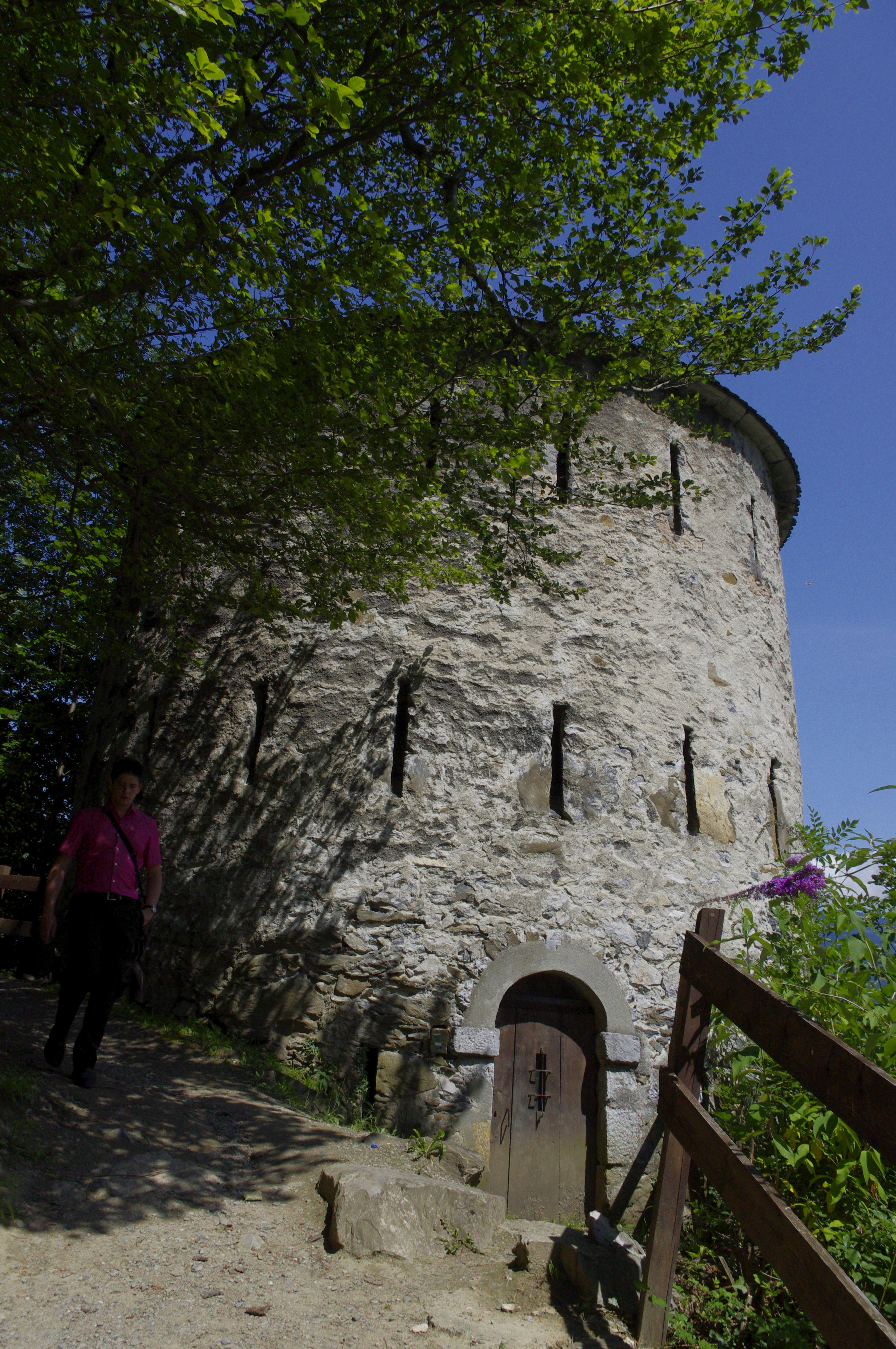 Wehrturm Dufour, Saint-Maurice, Wallis, Schweiz